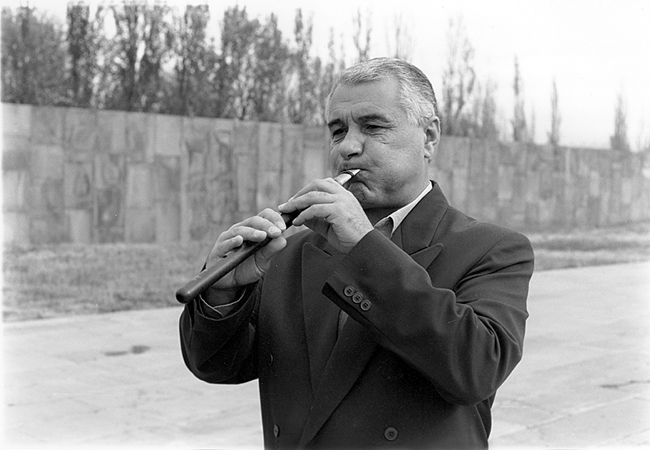 Maître Benik Ignatyan joue le doudouk